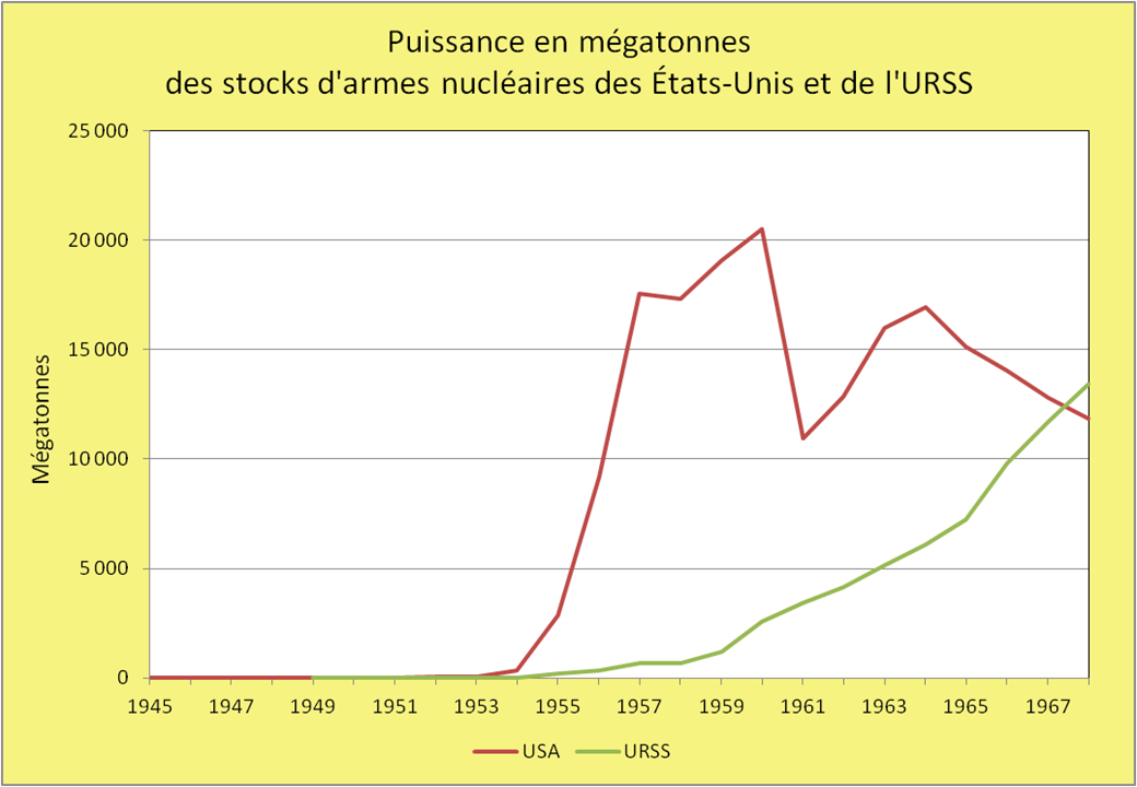 Graphique fournissant en mégatonnes la puissance du stock d'armes détenu par les USA et l'URSS de 1945 à 1968. Ce graphique est basé sur des statistiques figurant sur les sites du NRDC et du DOE américain.